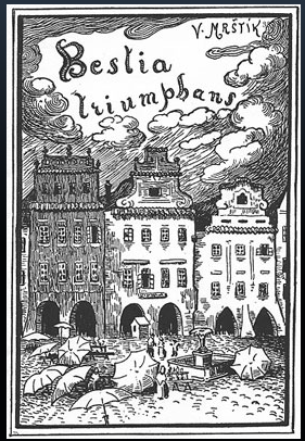 Obálka spisu Viléma Mrštíka Bestia triumphans z roku 1897